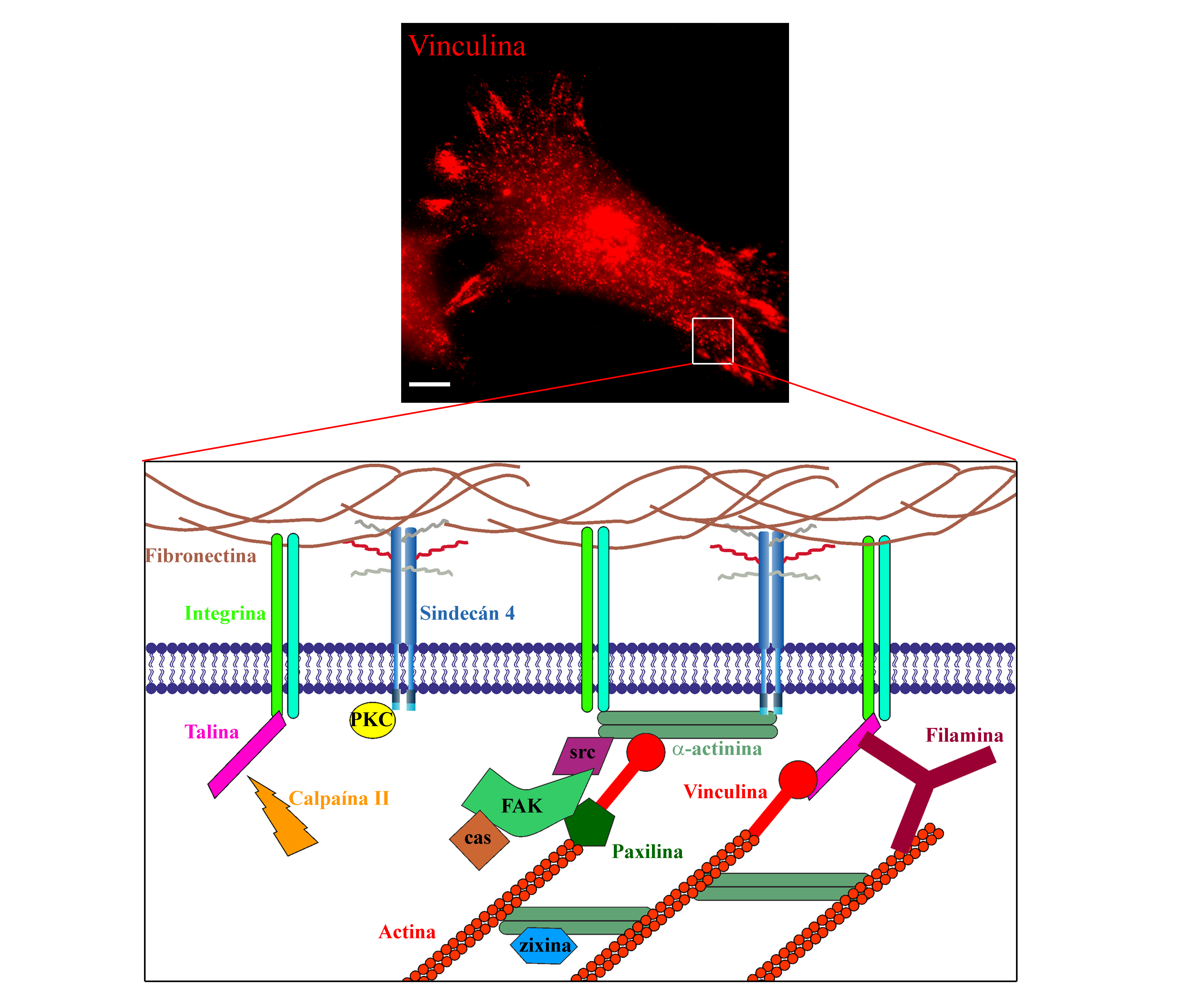 Esquema de una adhesión focal